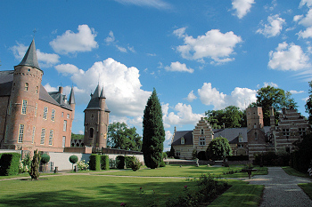 foto is eigendom van schrijver wikipedia-tekst kasteel heeswijk